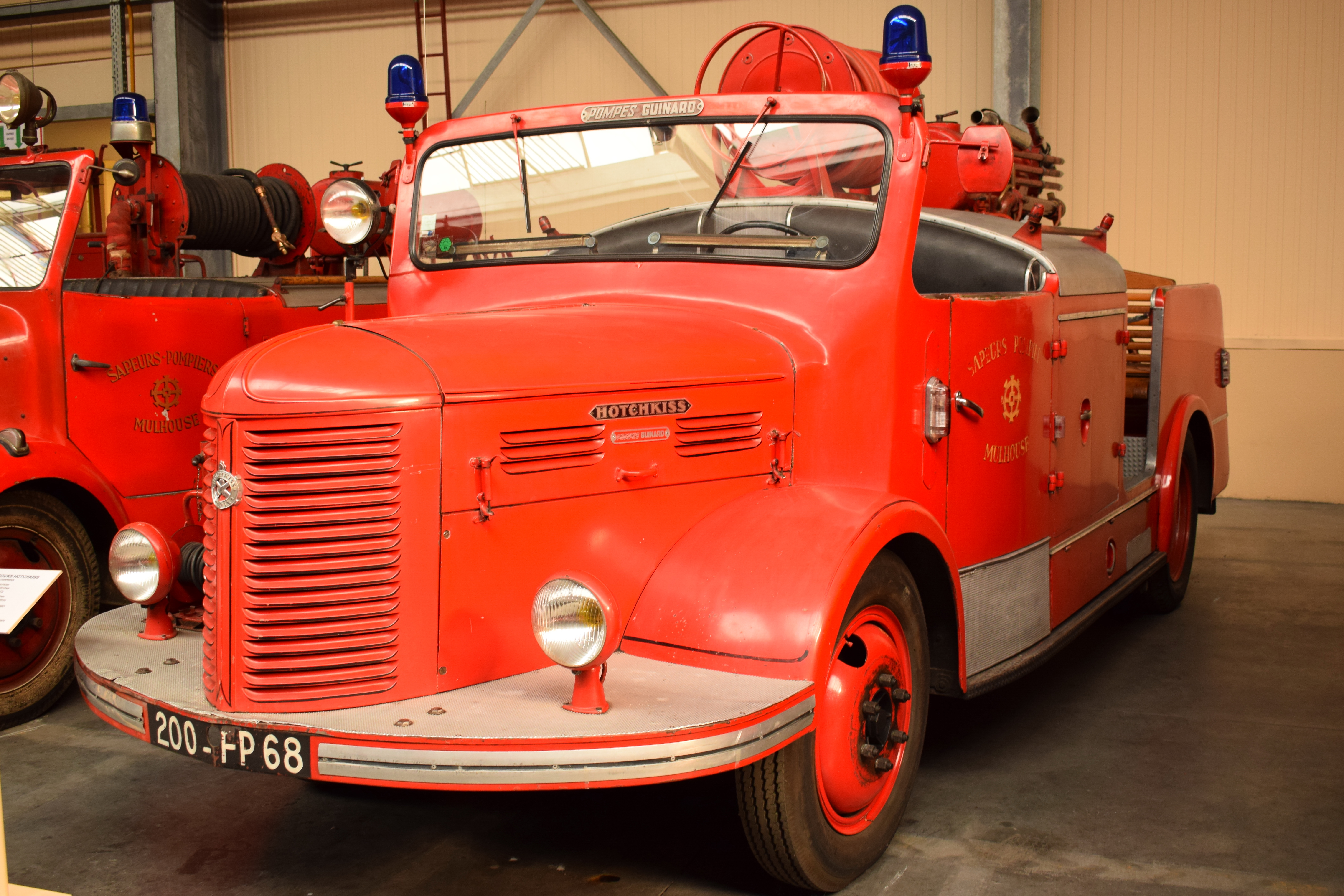 Musée du sapeur-pompier d'Alsace, Vieux-Ferette, France. Véhicule de premier secours Hotchkiss Torpedo PL50, 1960